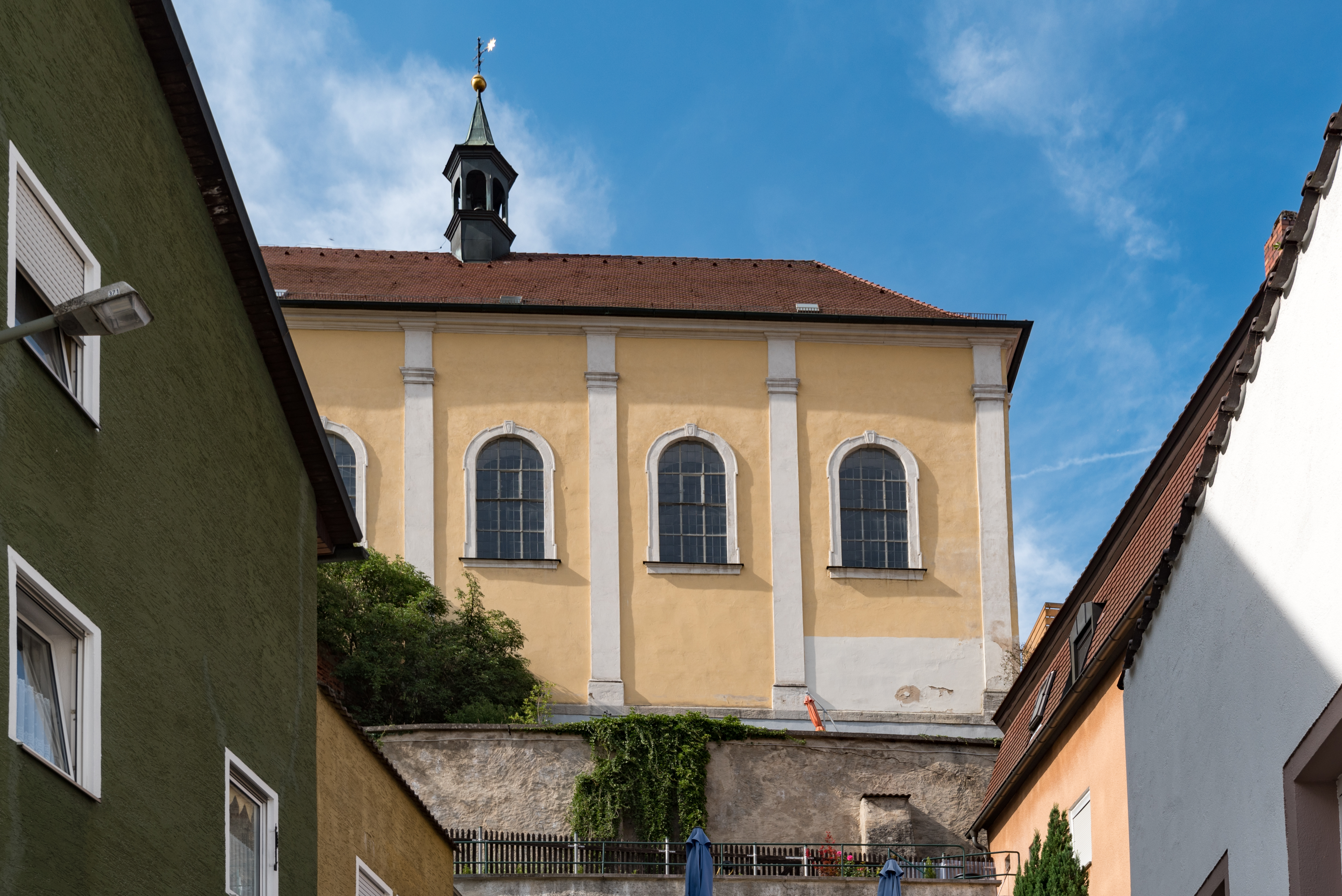 Sulzbach-Rosenberg, Klostergasse 2, von Süden